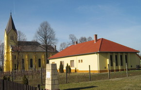 A hetényegyházi Jézus Szíve római katolikus templom és parókia épülete a Kossuth utcán.